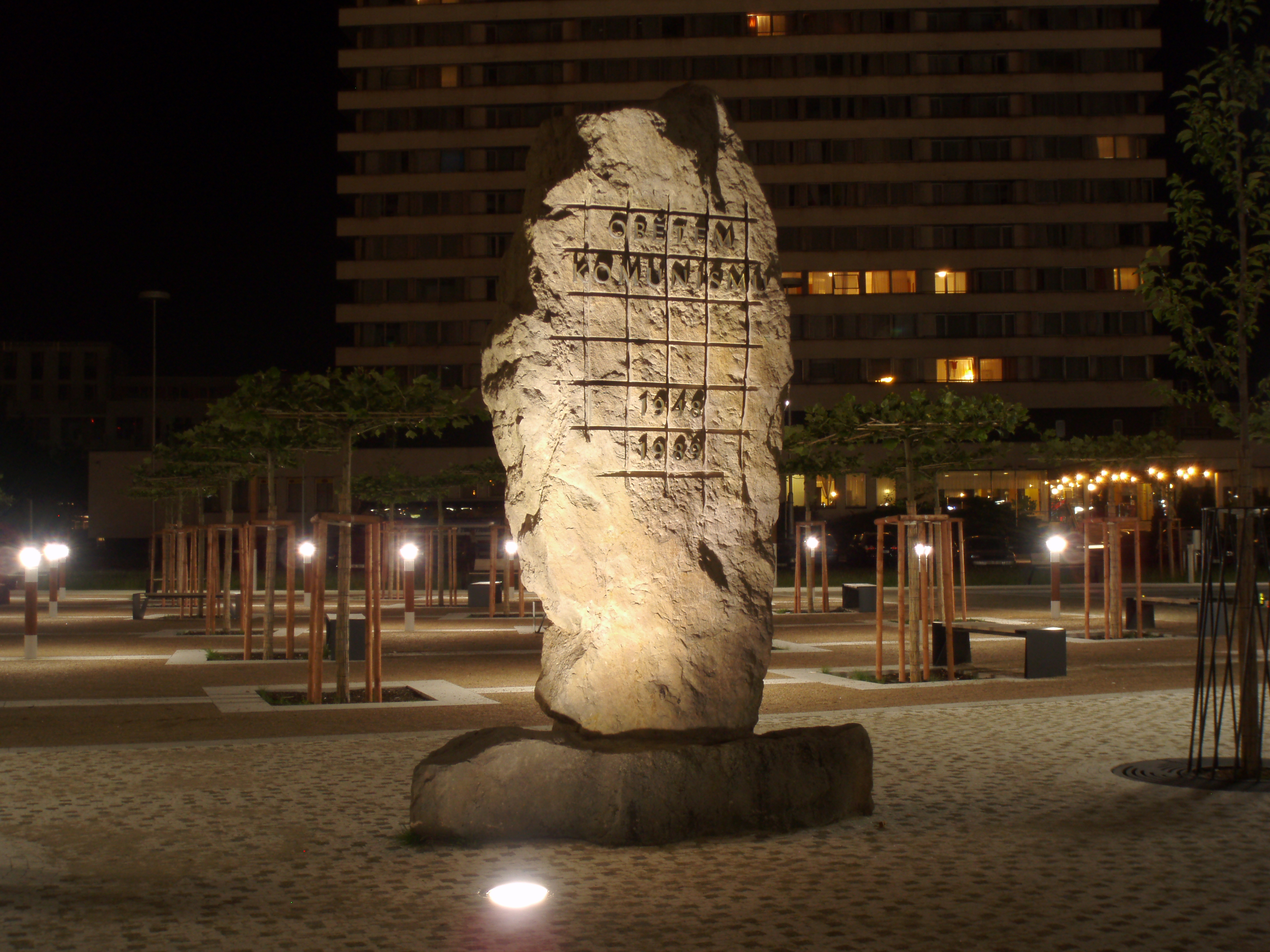 Památník obětem komunismu v Hradci Králové